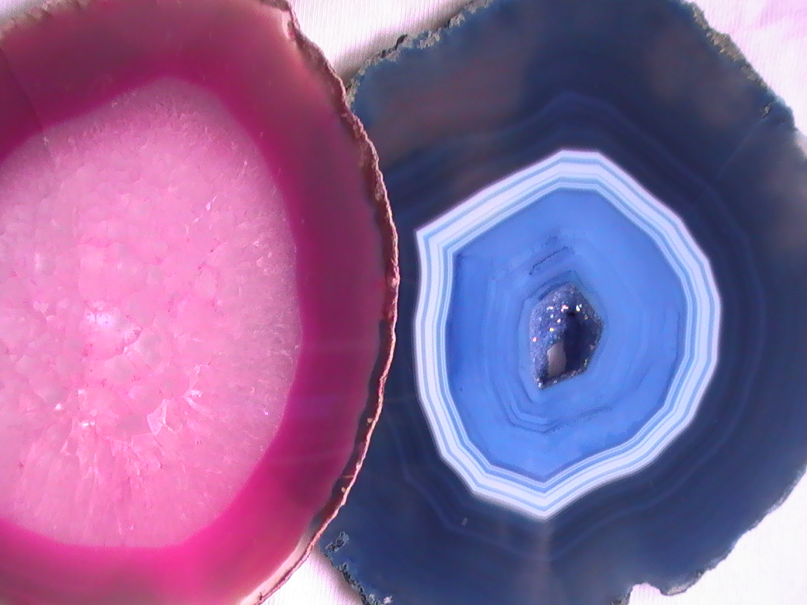 Norge